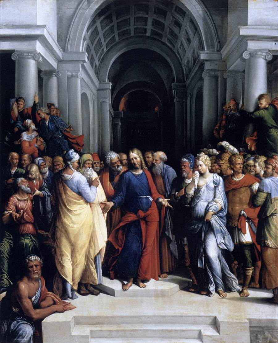 Cristo y la adúltera, Museum of Fine Arts, Budapest